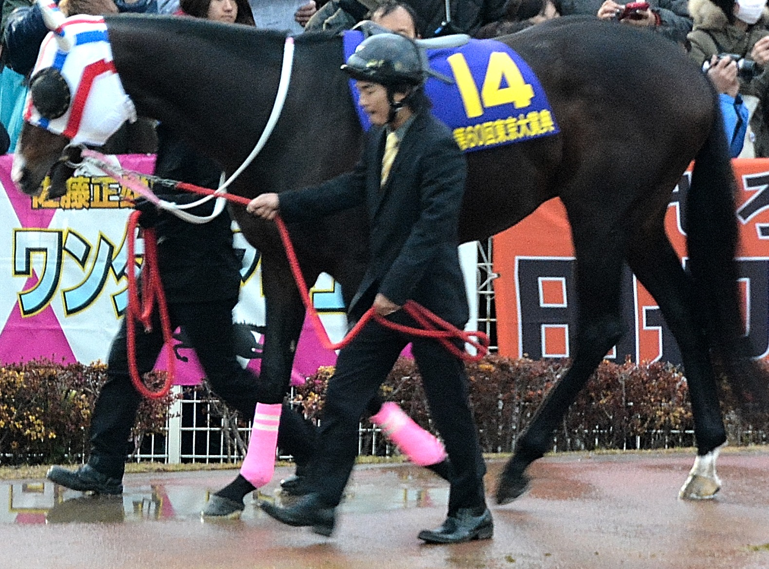 2014年12月29日に大井競馬場の第10競走で行われた「第60回東京大賞典」で、出走前のパドックで周回しているワンダーアキュートを、観客席の2階から撮影したもの。（参考： ）